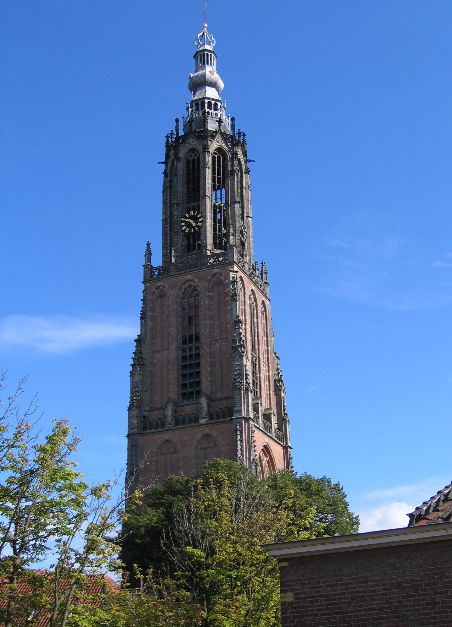 De Onze lieve vrouwentoren in Amersfoort